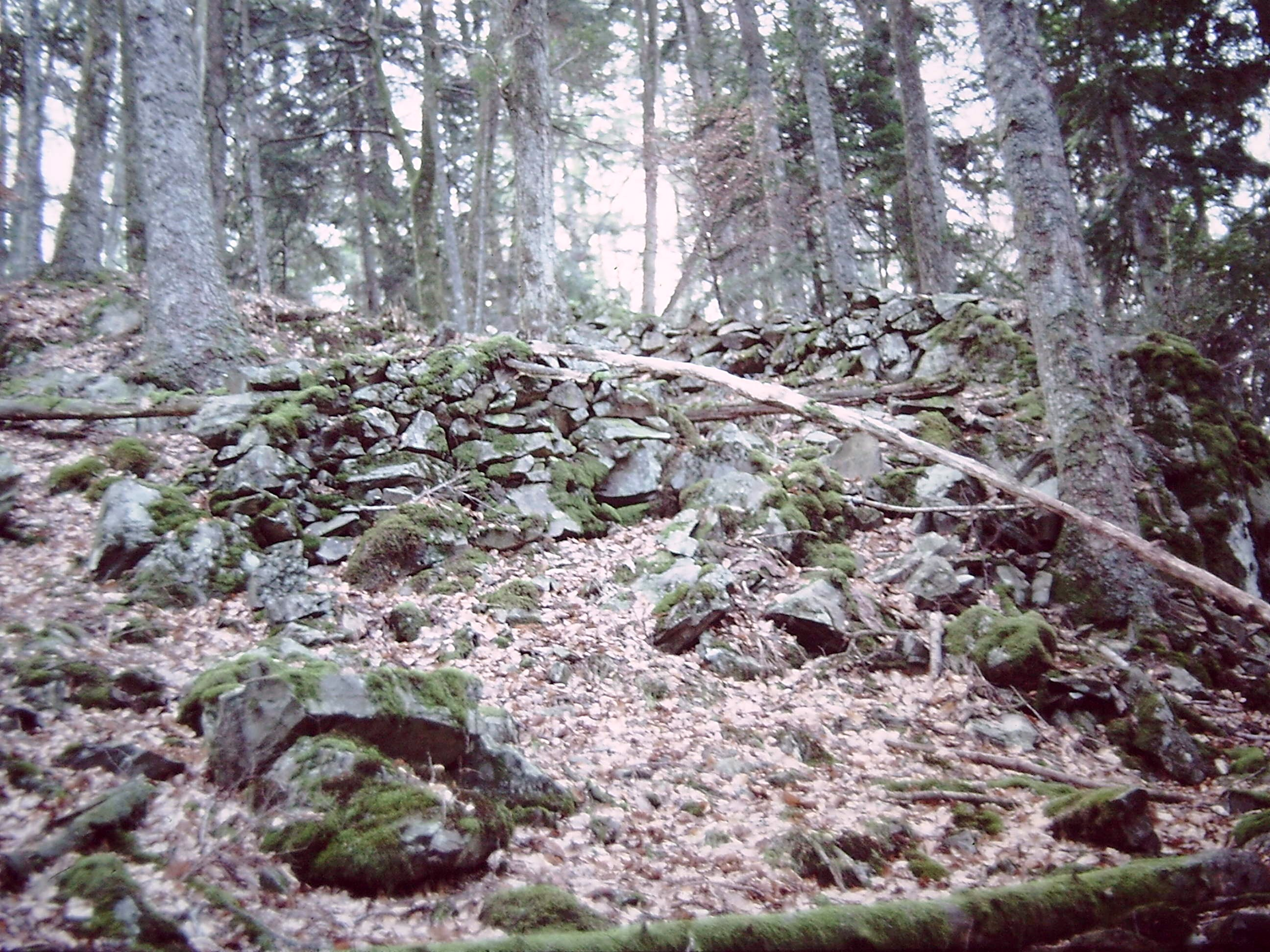 Château de l'Husenbourg: Poste de tir de la Première Guerre mondiale construit avec les pierres du château